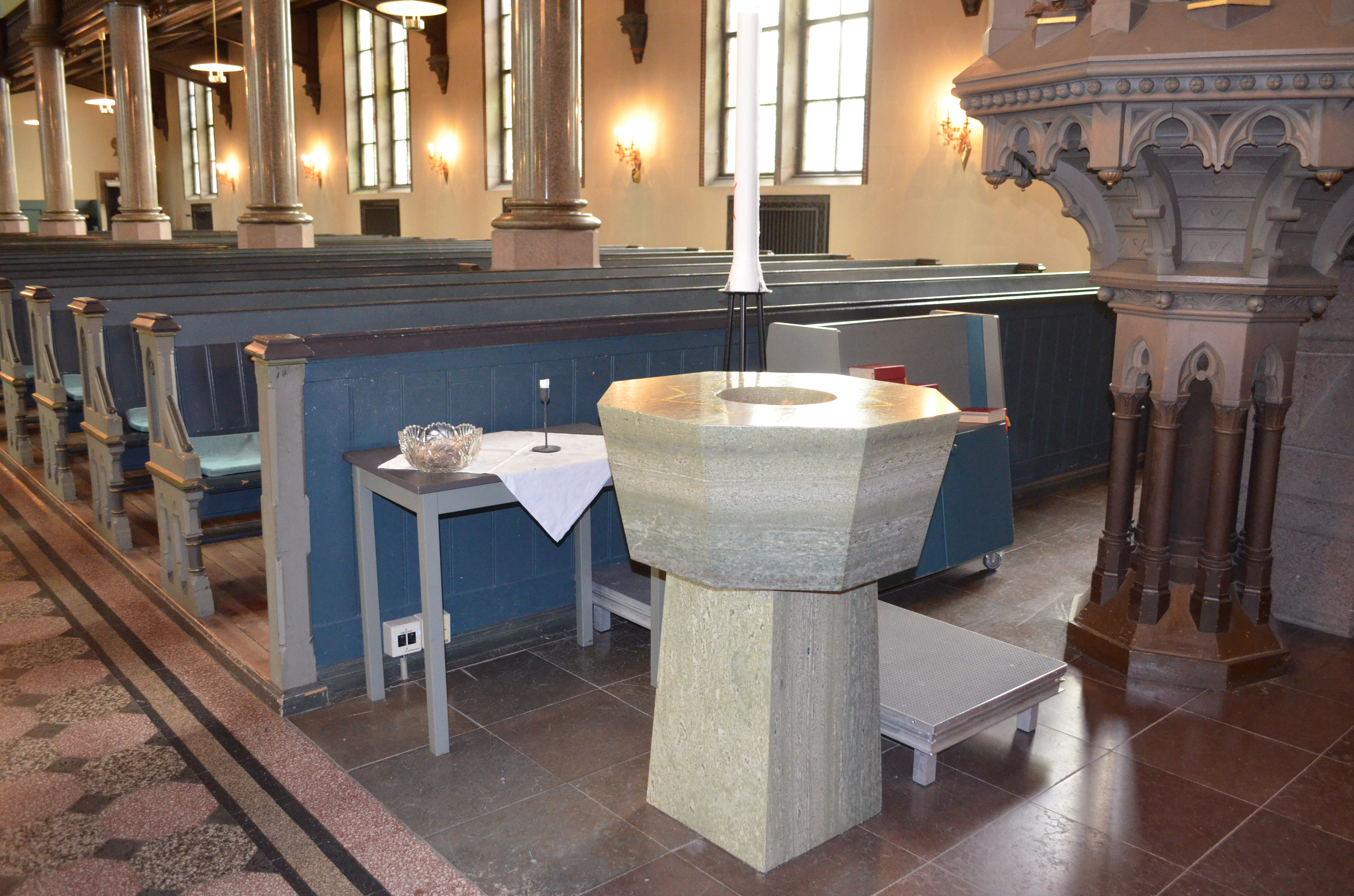 Dopfunten.